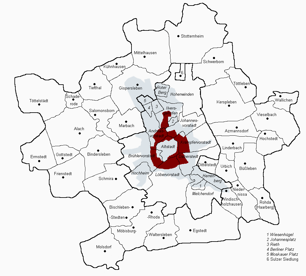 Ungefähre Lage der Gründerzeit-Quartiere in Erfurt.